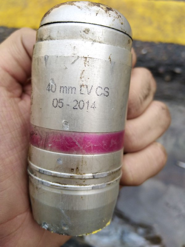 قنبلة مسيل دموع خارقة للتحصينات بلغارية الصنع - الثلاثاء 29